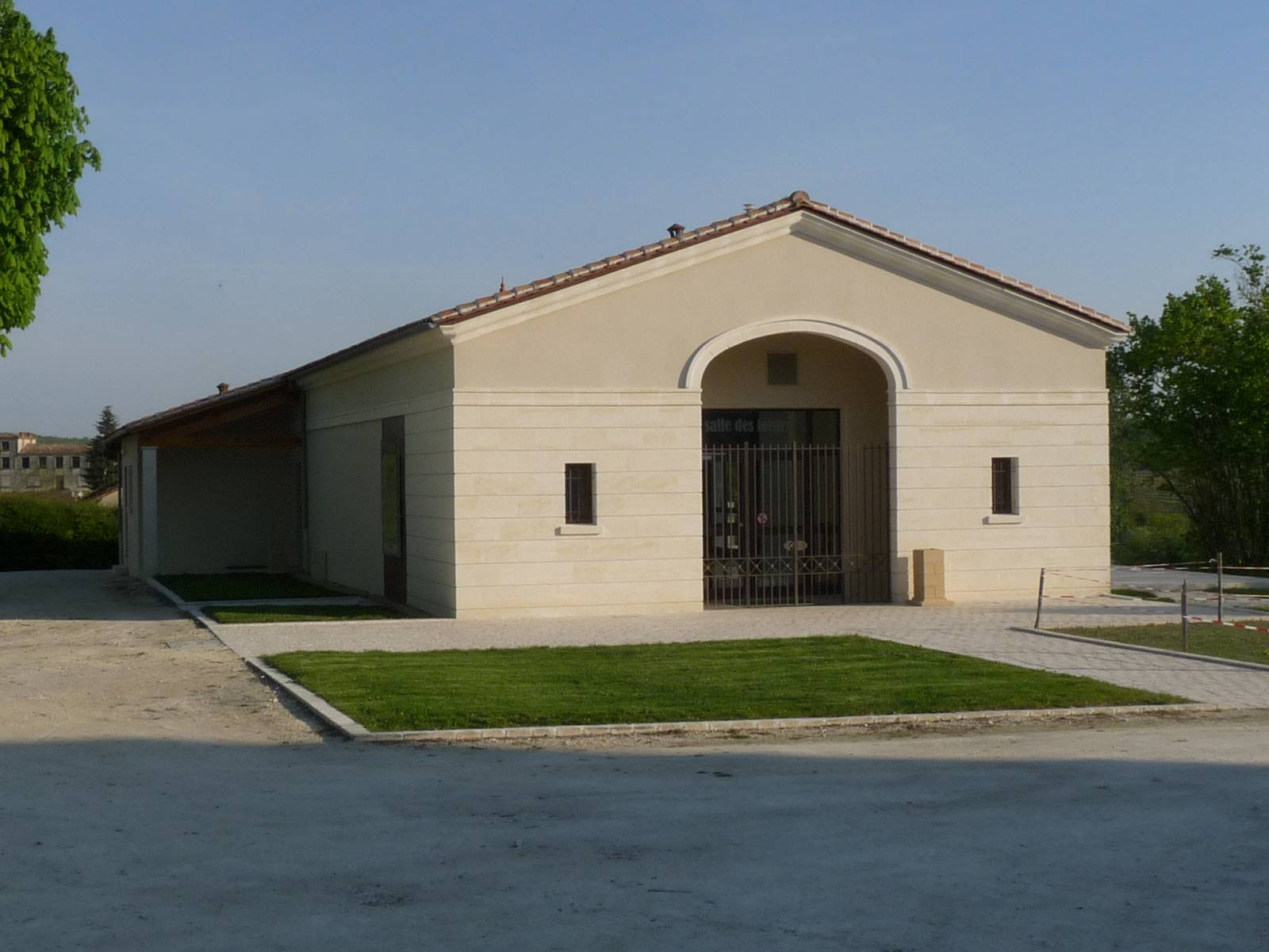 Salle des fêtes de Touzac, Charente, France